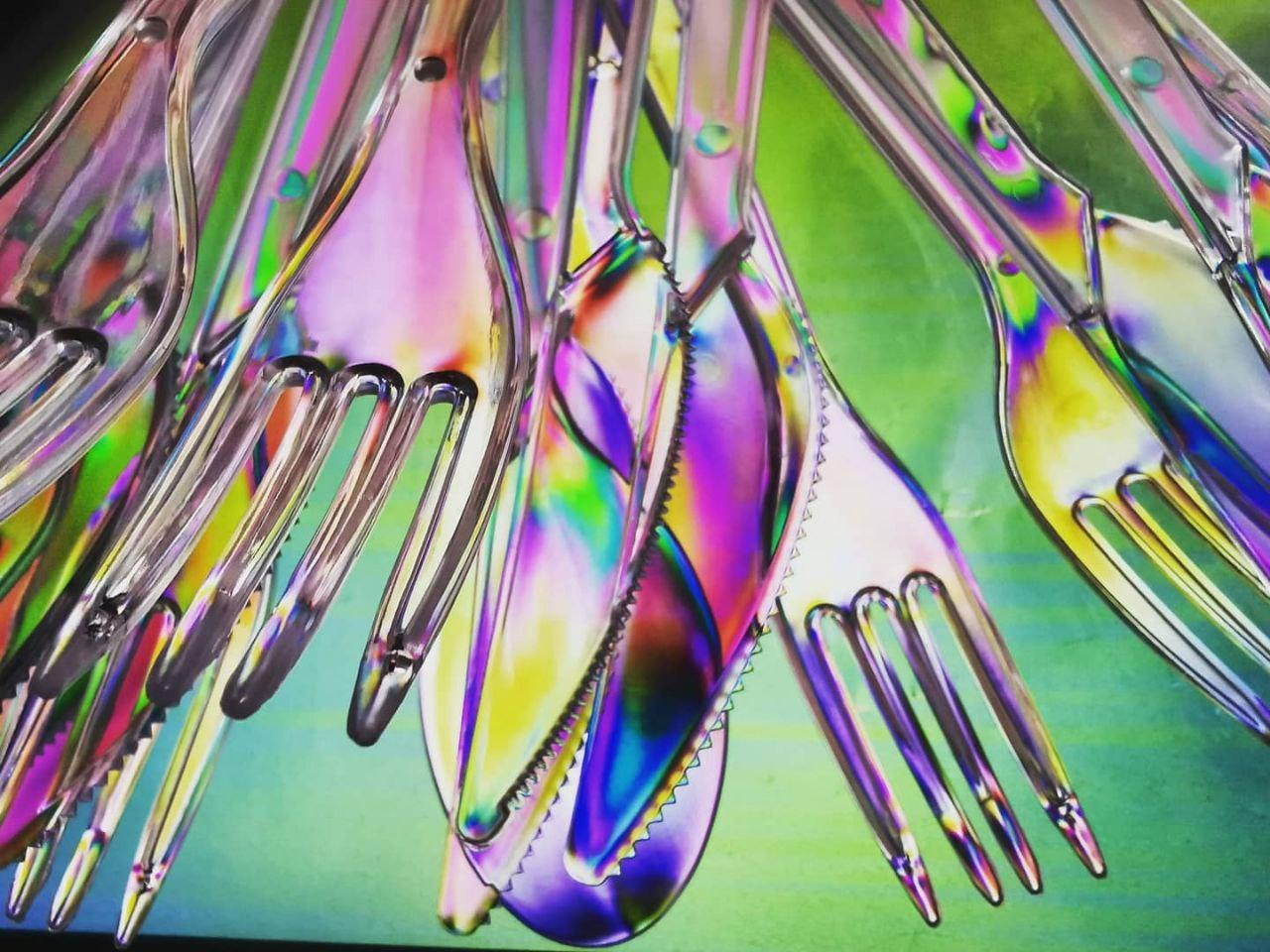 Упрощенное описание эффекта: Молекулы пластика являются вытянутыми, и в столовых приборах на картинке расположены неизвестным образом. Но из-за того, что они вытянуты, показатель преломления для света, поляризованного вдоль молекул и поперек, вообще говоря, отличается. Рассмотрим, что происходит при прохождении линейно поляризованного света через слой пластика какой-либо толщины. Из-за того, что молекулы могут быть ориентированы по отношению к исходной поляризации как угодно, то в общем случае она проецируется на направление вдоль молекул и поперек, и из-за разницы показателя преломления две проекции выходят с разной фазой. Фаза зависит от толщины материала и длины волны света. Поскольку на выходе есть две ортогональные по поляризации компоненты света со случайным сдвигом по фазе, это значит, что на выходе поляризация света может быть эллиптической, круговой, линейной, но повернутой относительно исходной, т.е. произвольной в зависимости от ориентации молекул и толщины пластика, при этом разной для разных длин волн. При этом при наблюдении прошедшего света через второй поляризатор(анализатор) пройдут только те компоненты, которые поляризованы вдоль оси анализатора. И если исходный свет был белый, а поляризация на выходе разная для разных длин волн, то из белого света будет вырезана только часть спектра, приводящая к окрашиванию пластика как на фото.